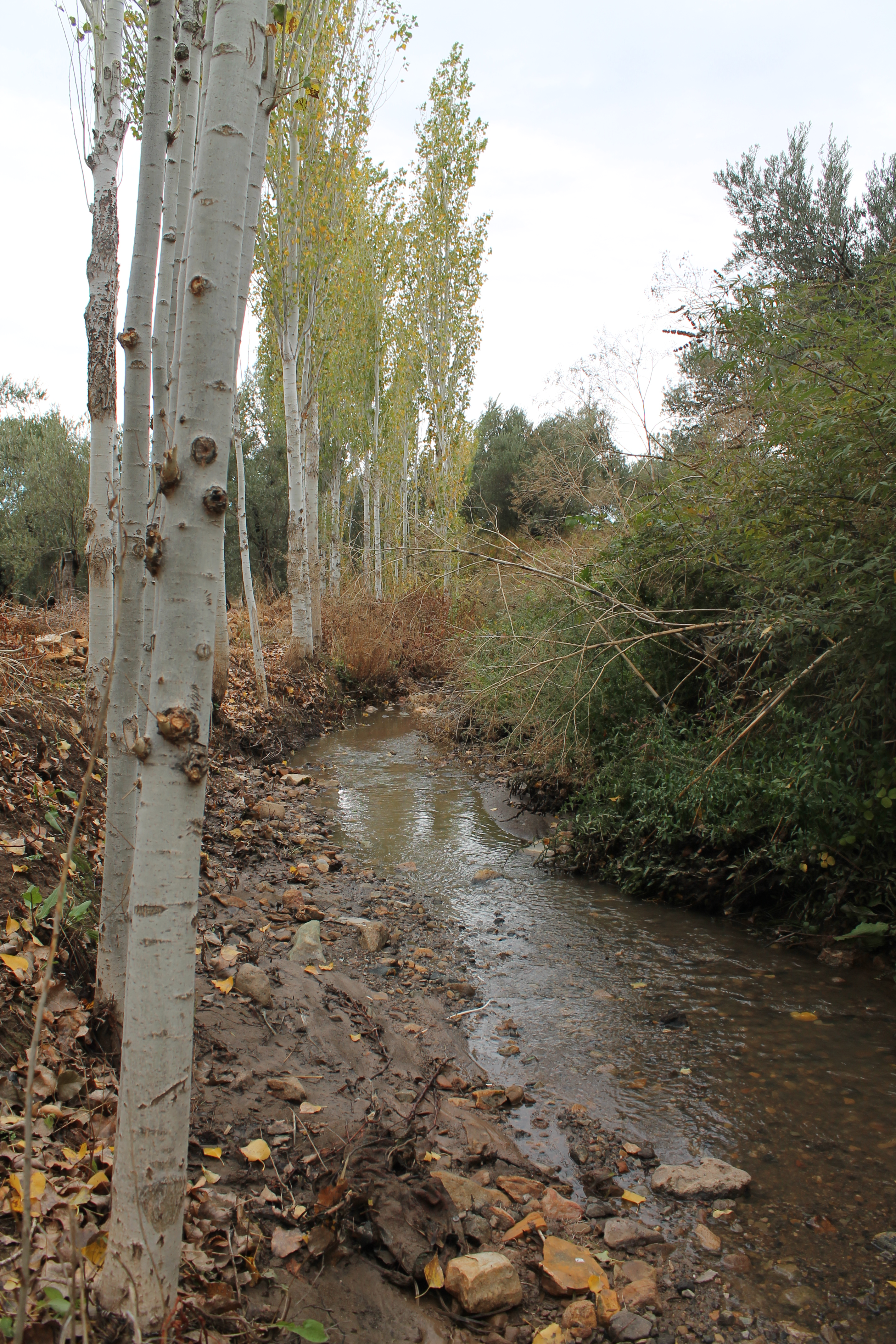 Tilki deresi